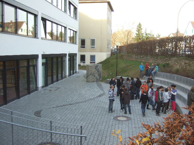 „Kunsthof“ der Gesamtschule Bonn-Bad Godesberg mit einer Plastik – ein Mauerelement aus Gabionen – nach einem Entwurf eines ehemaligen Schülers